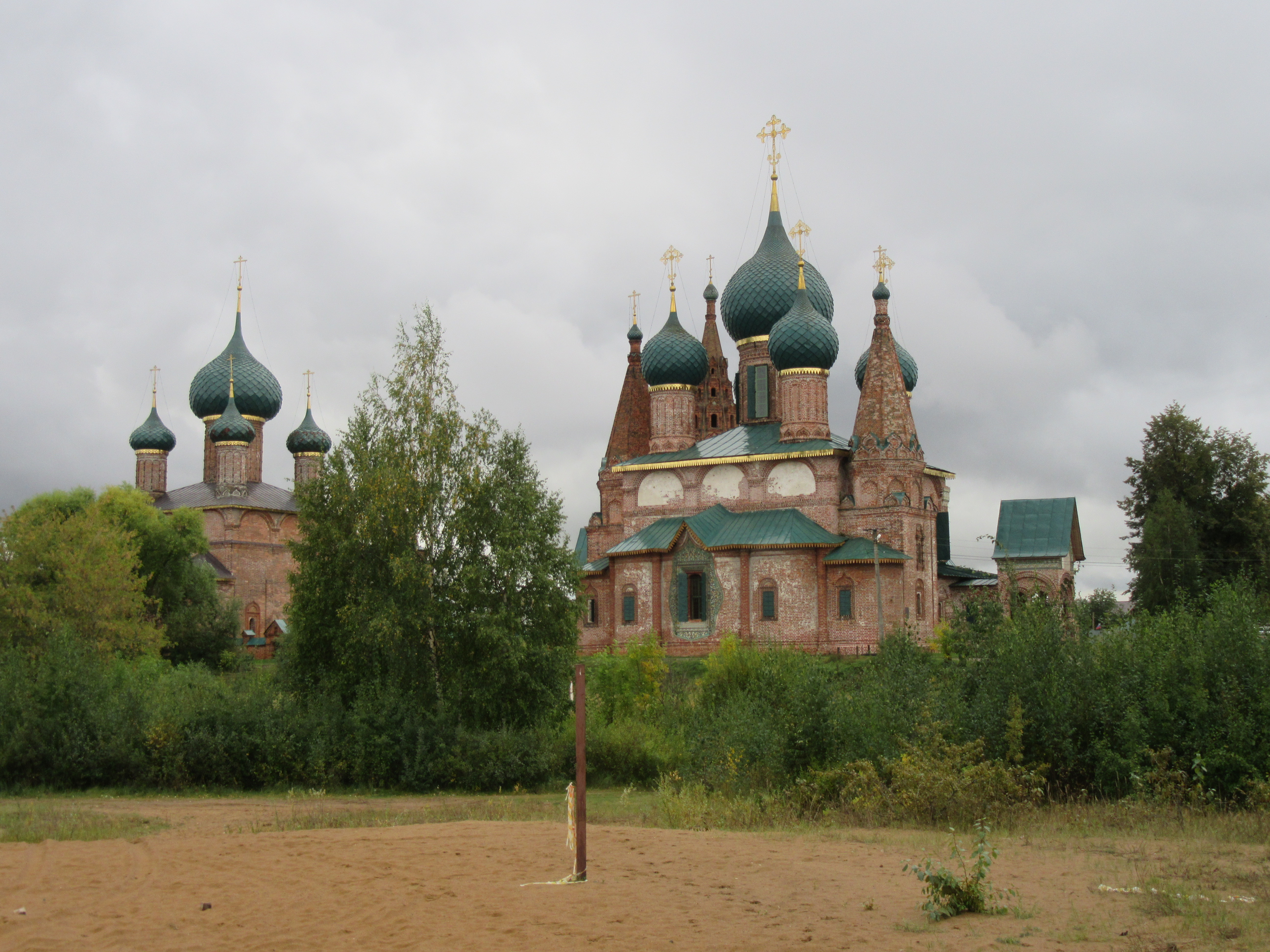 Vue de côté des deux églises proches de Saint-Jean Chrysostome